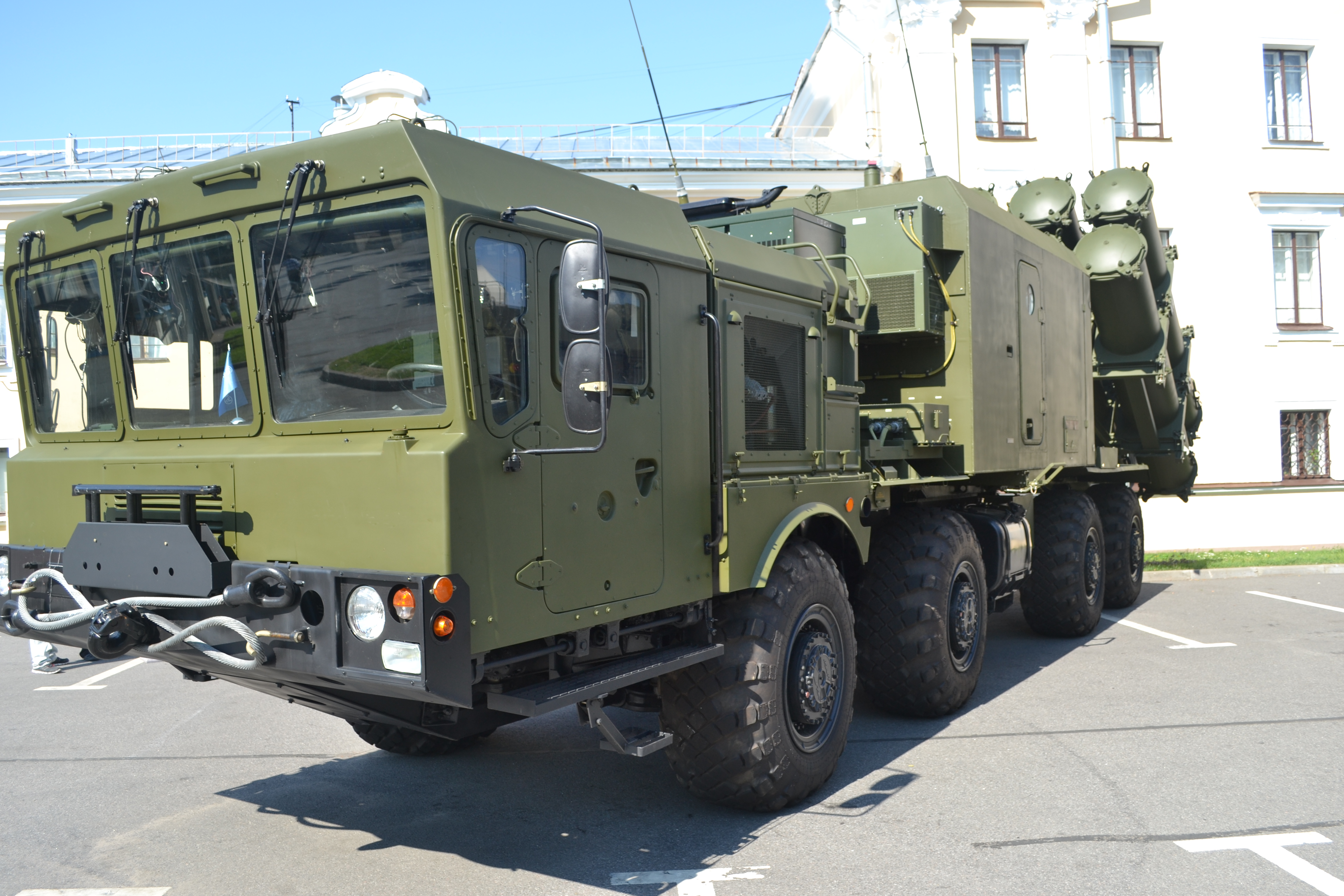 БПРК Бал-Э